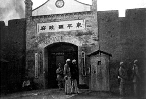 中文（中国大陆）: 东平解放后中国共产党控制下的东平县政府